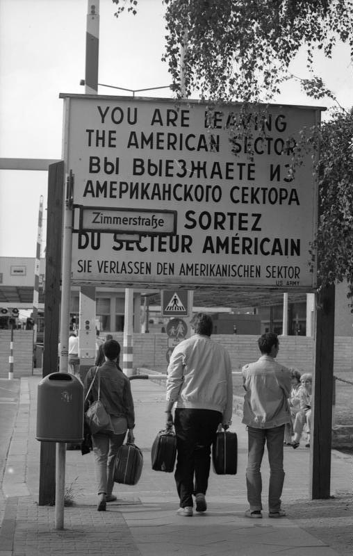 Juni 1988 Berlin (West), Grenzübergang Checkpoint Charlie, Bezirk Kreuzberg